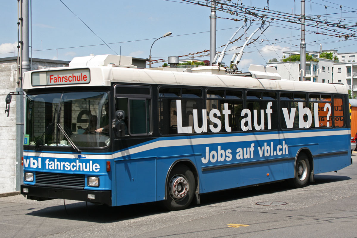 Der NAW/Hess/Siemens BT 5-25 Nr. 253 der vbl; Fahrschulwagen